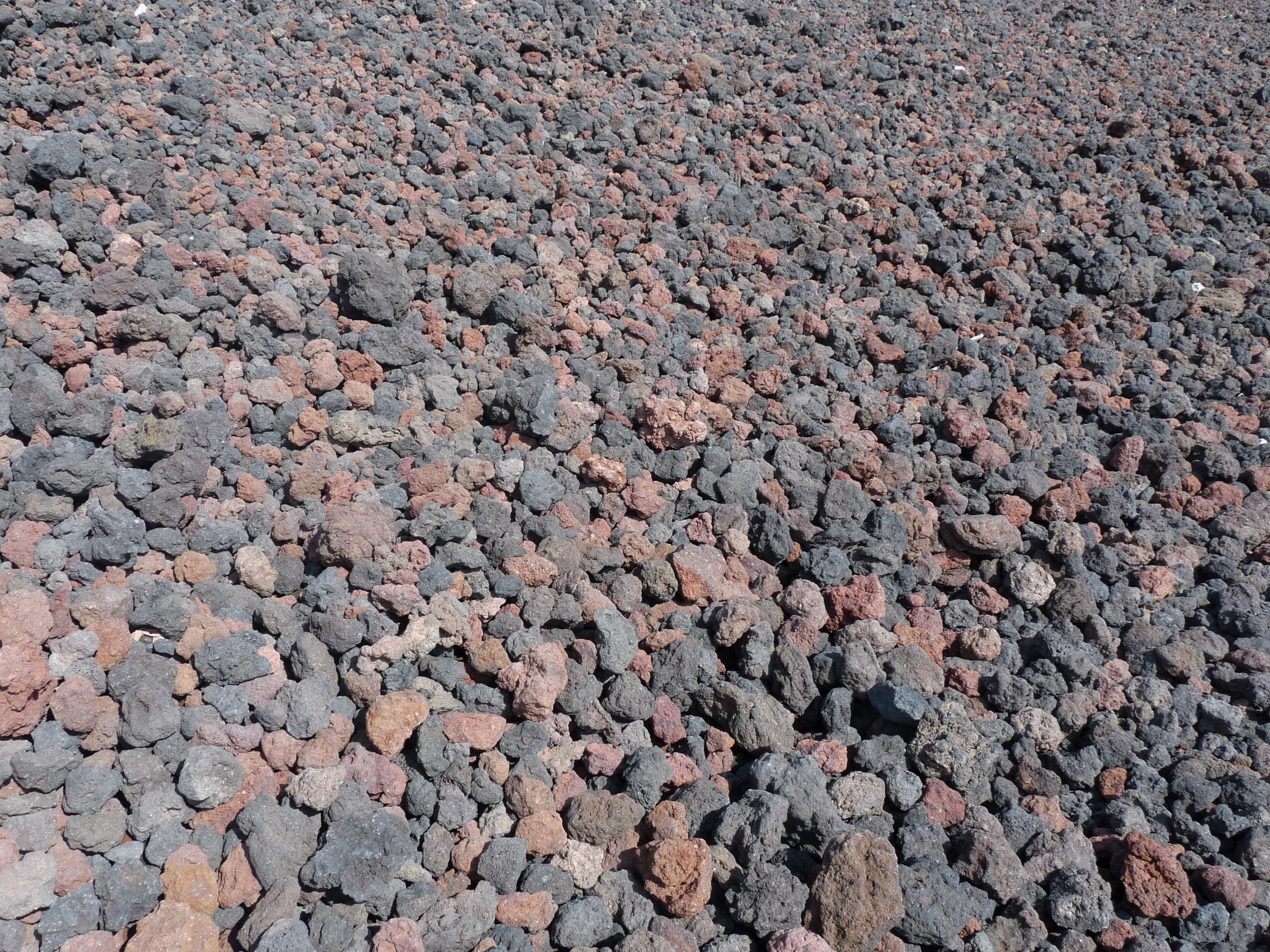 Lapilli à l'Etna (Sicile)